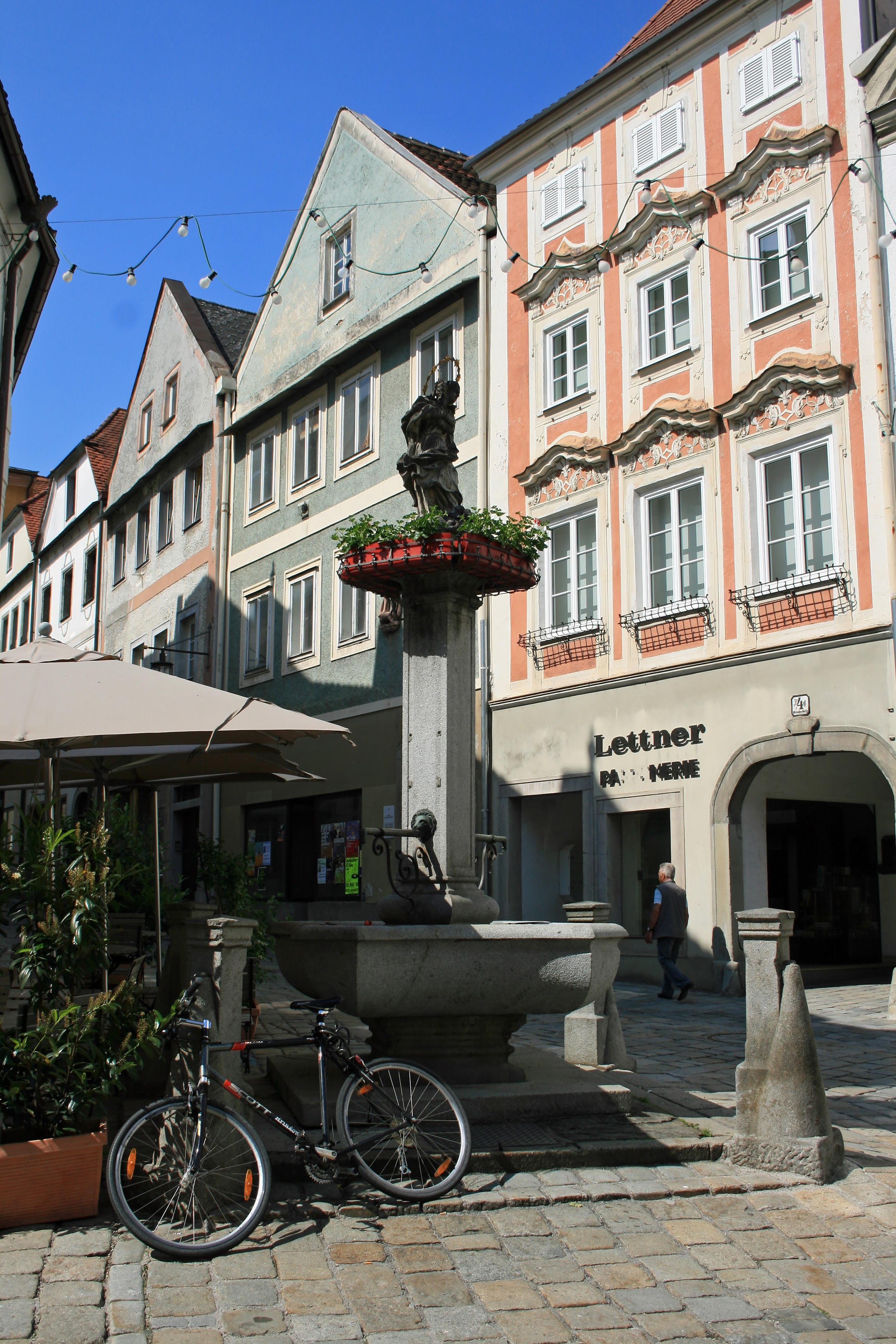 Der Rote Brunnen im Steyrer Stadtteil Steyrdorf.